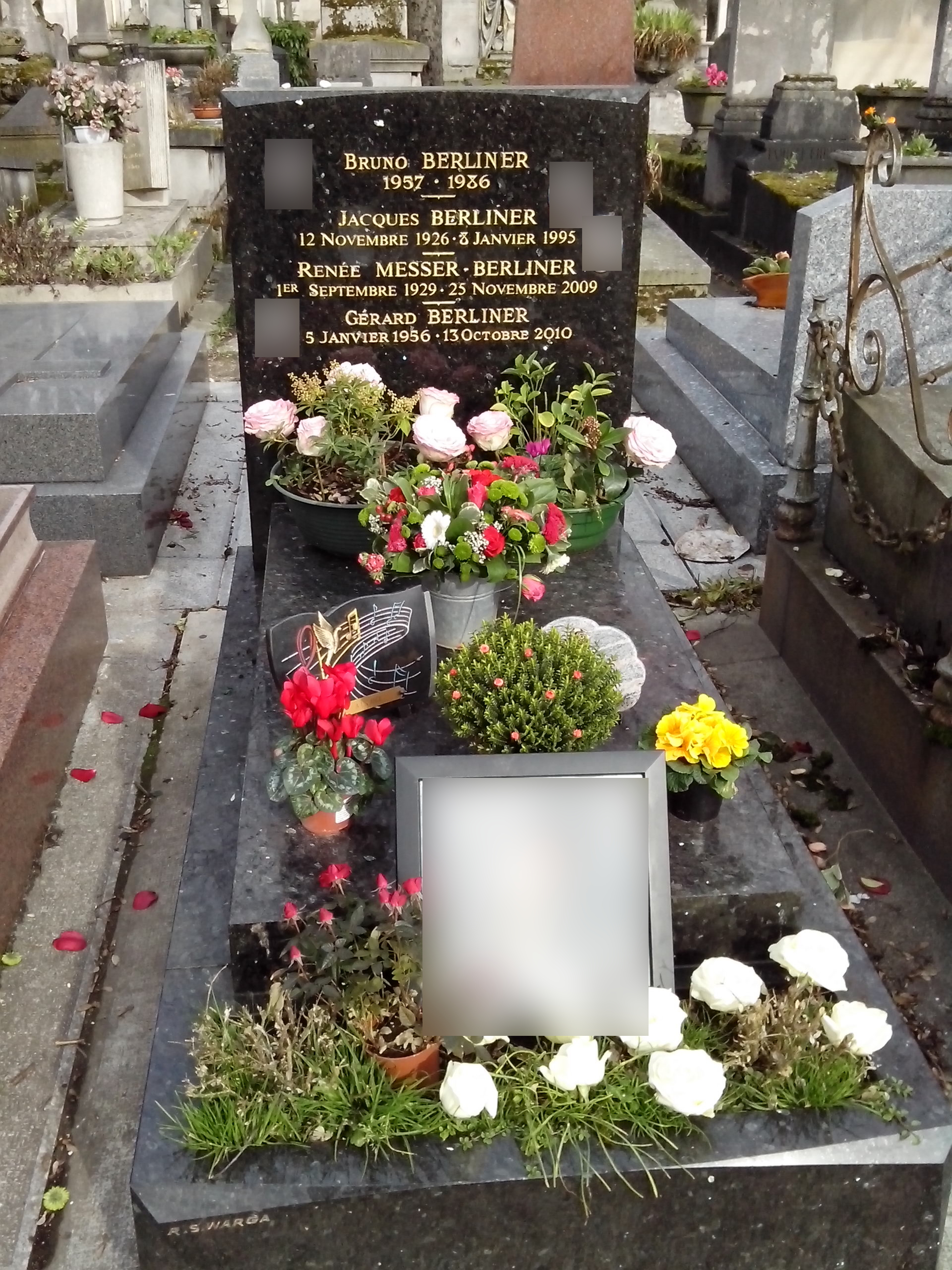 Vue d'ensemble